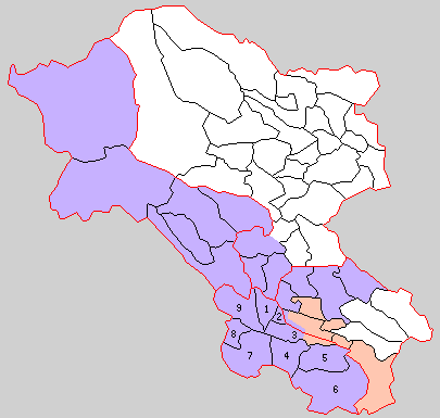 宮城県志田郡の町村。